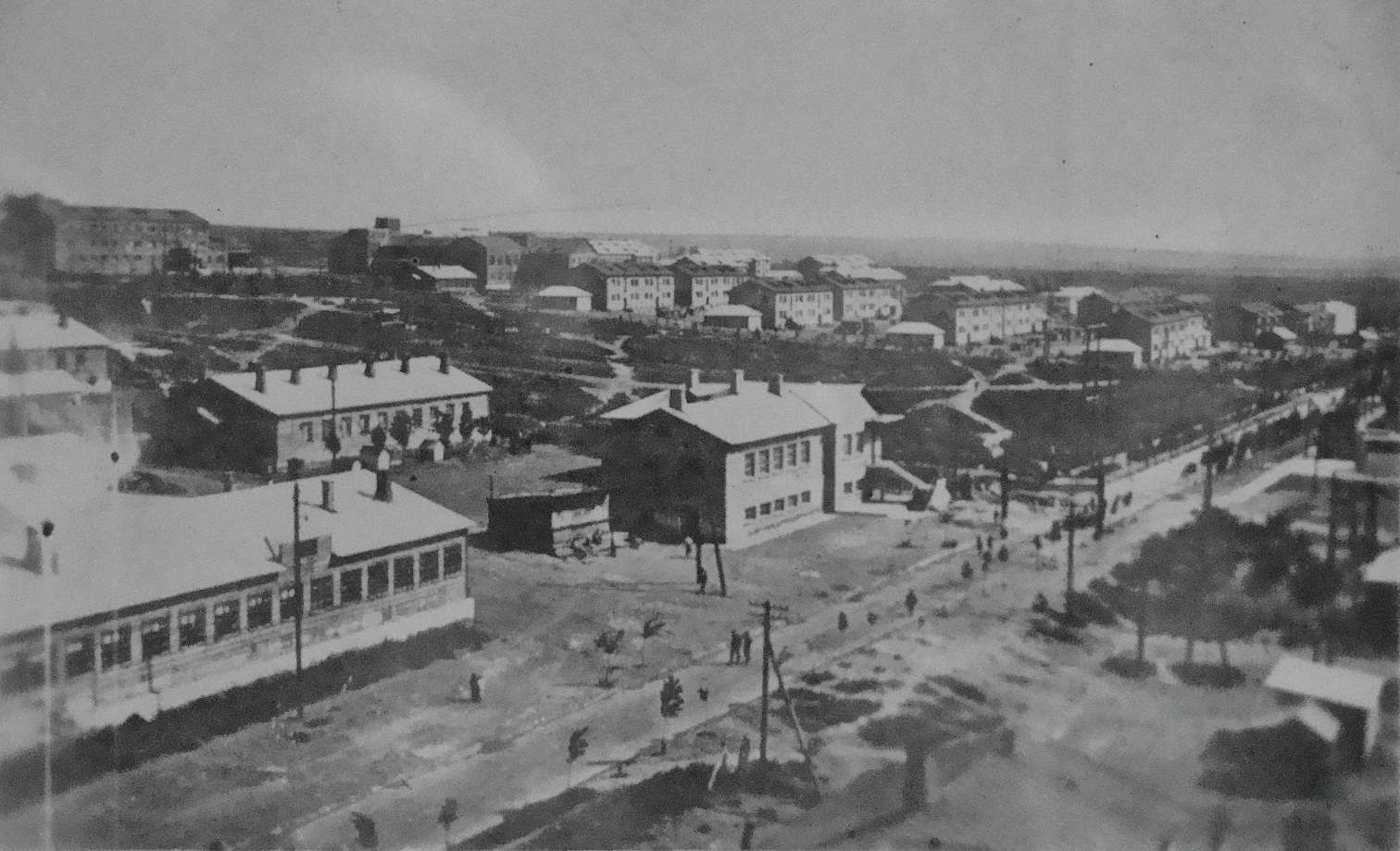 Начальная застройка Зугрэса.